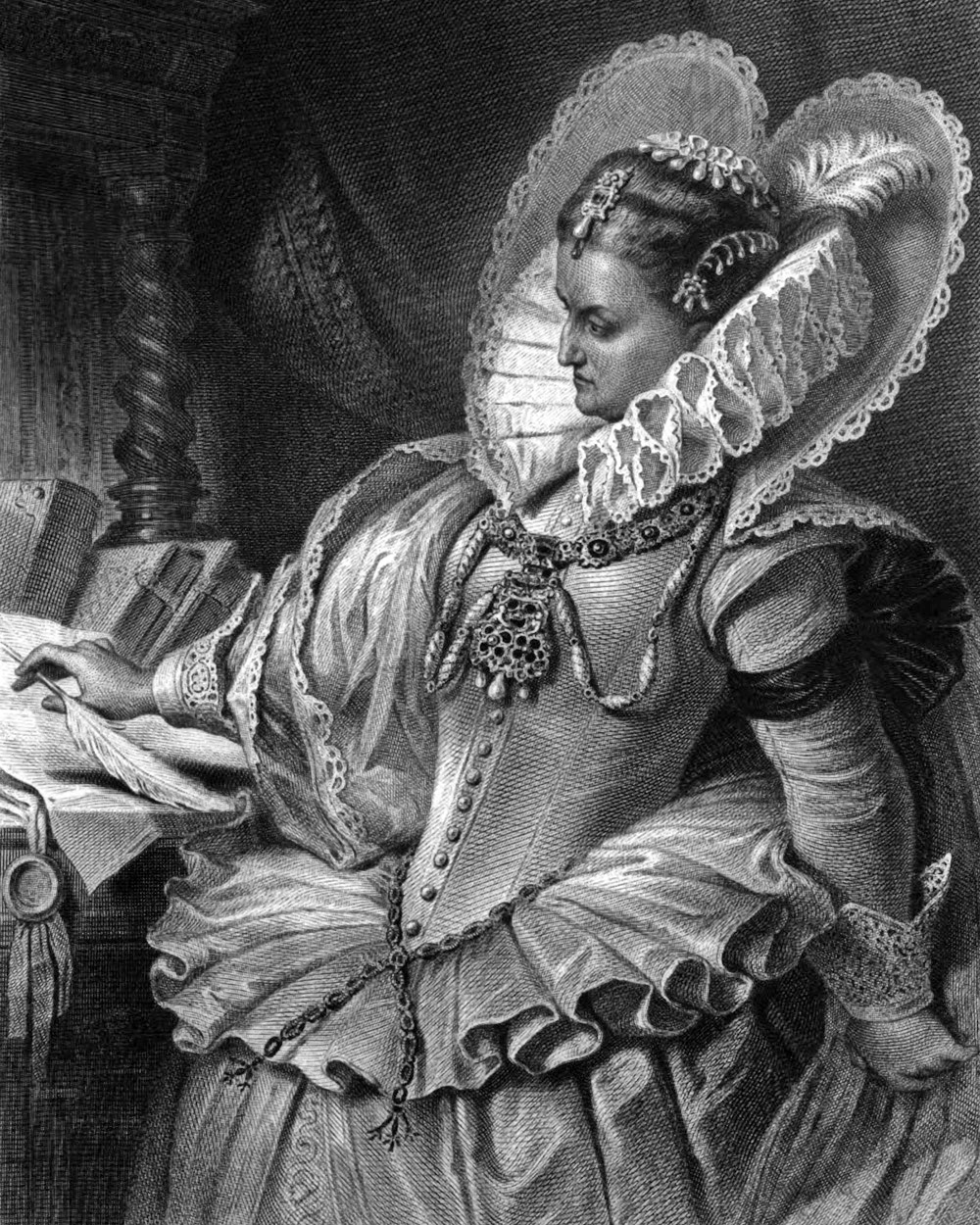 Königin Elisabeth aus Friedrich Schillers Drama Maria Stuart, als Stahlstich gestochen um 1859 nach einer Zeichnung von Arthur von Ramberg